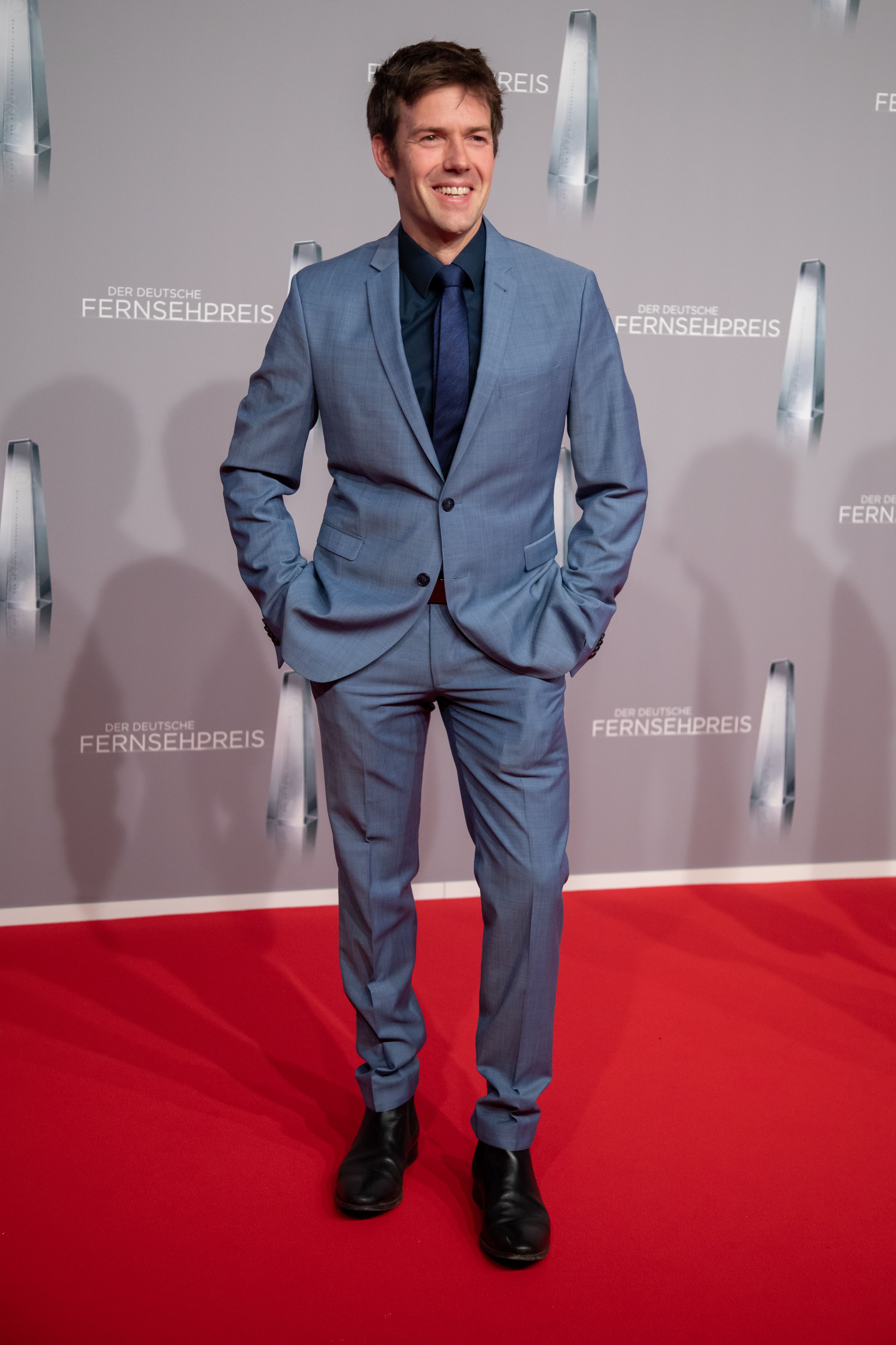 Mauk Meuser beim Deutschen Fernsehpreis 2019 in der Düsseldorfer Rheinterrasse